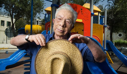 פרופסור לחינוך משה דב כספי